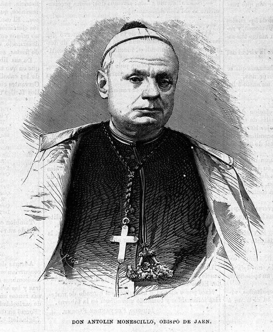 Antolín Monescillo, obispo de Jaén, en la revista La Ilustración de Madrid.